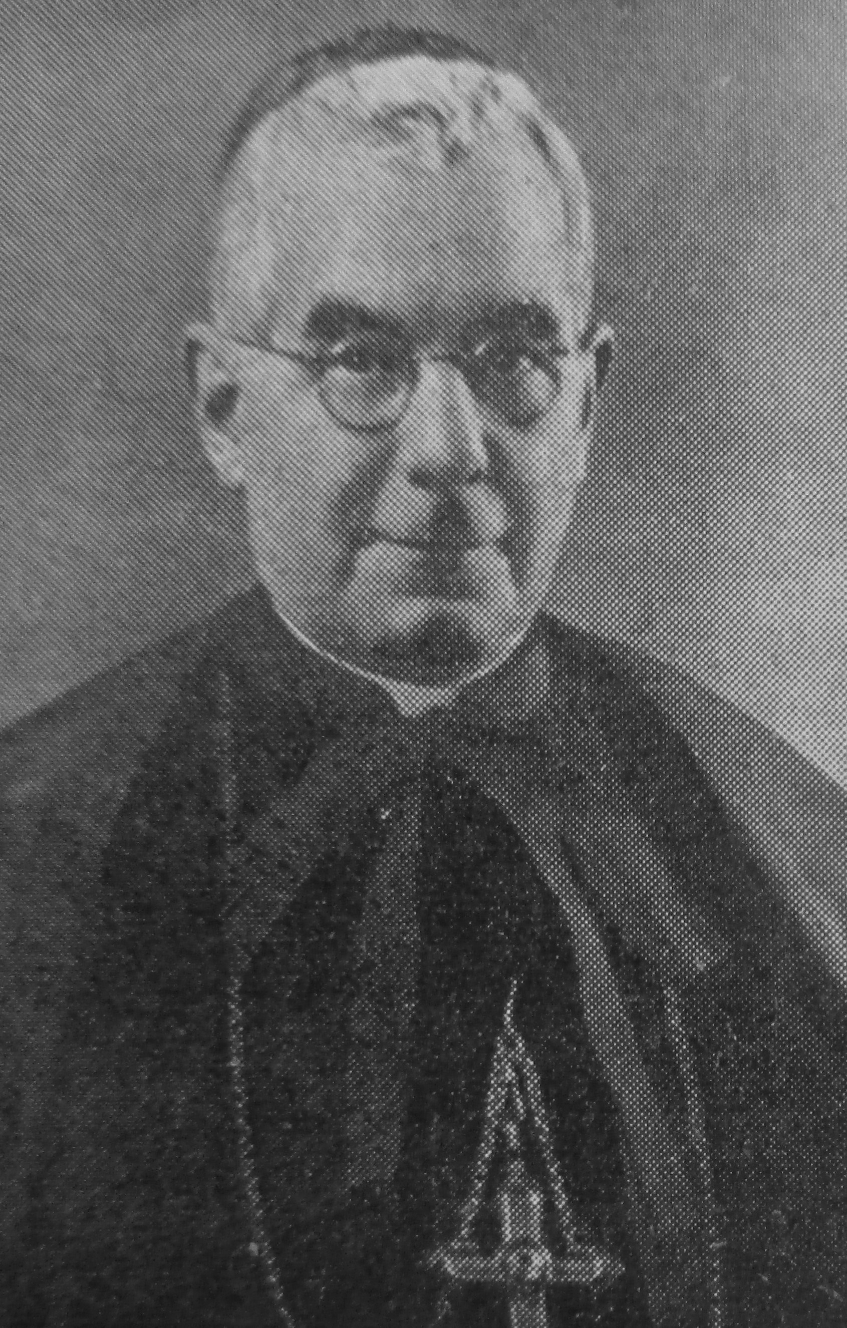 Photographie du cardinal Pellegrinetti parue dans L'Illustration, hors série de février 1939 consacré à la mort de Pie XI.